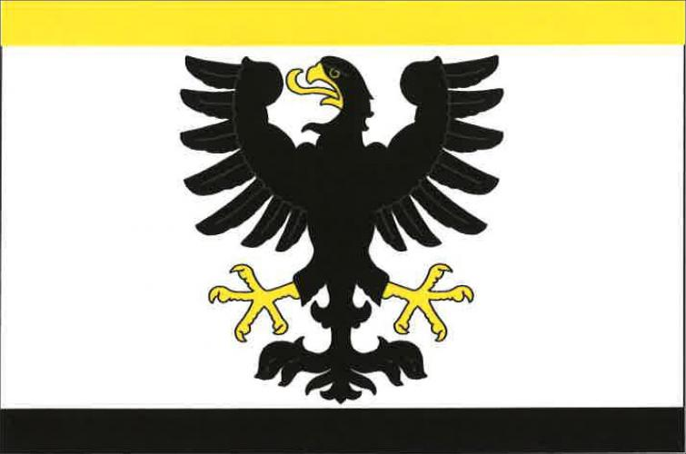 Panenský Týnec vlajka